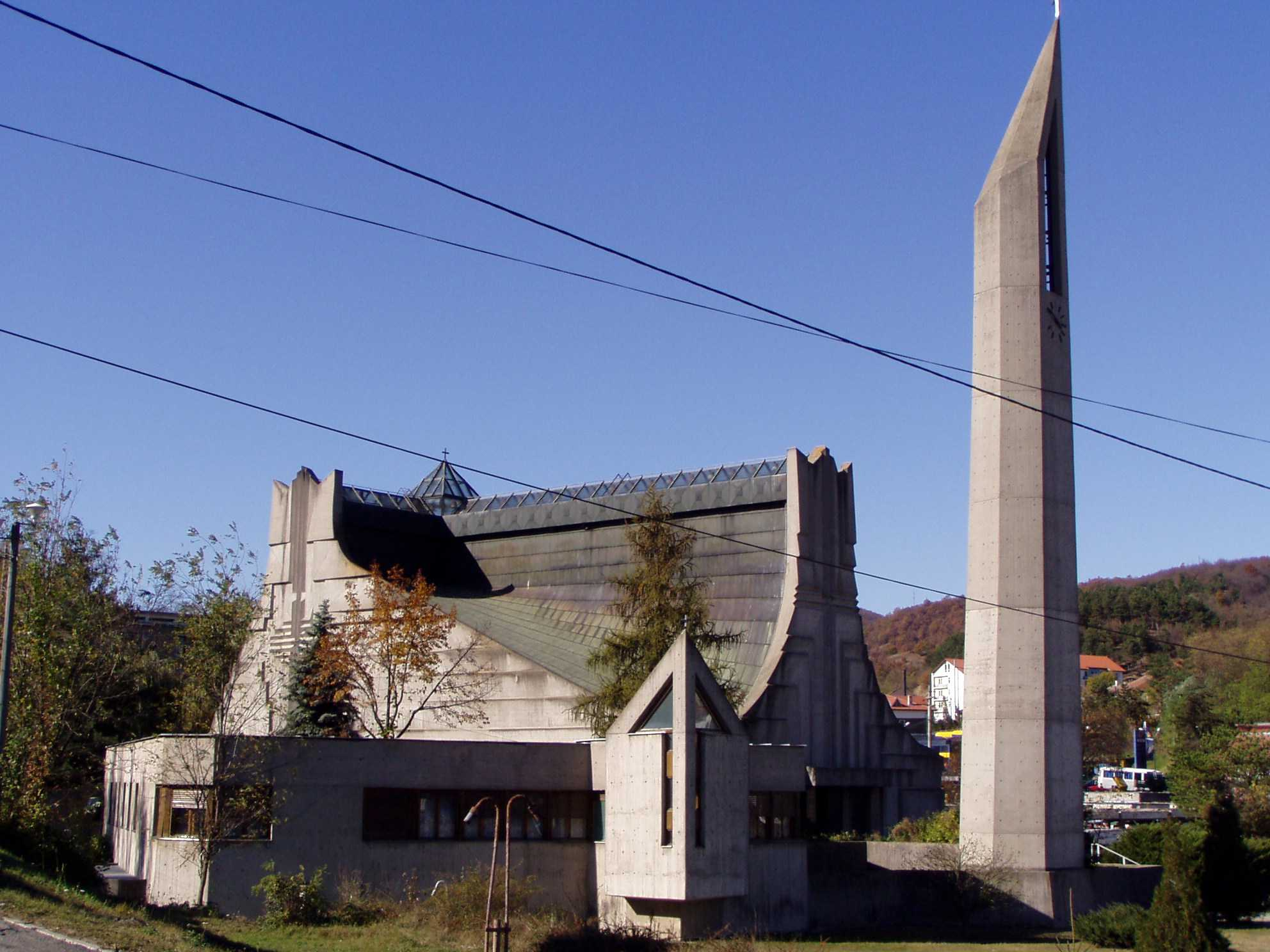 katholische Kirche in Orşova